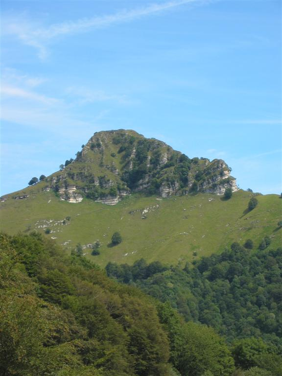 Mte Bisbino sasso Gordona